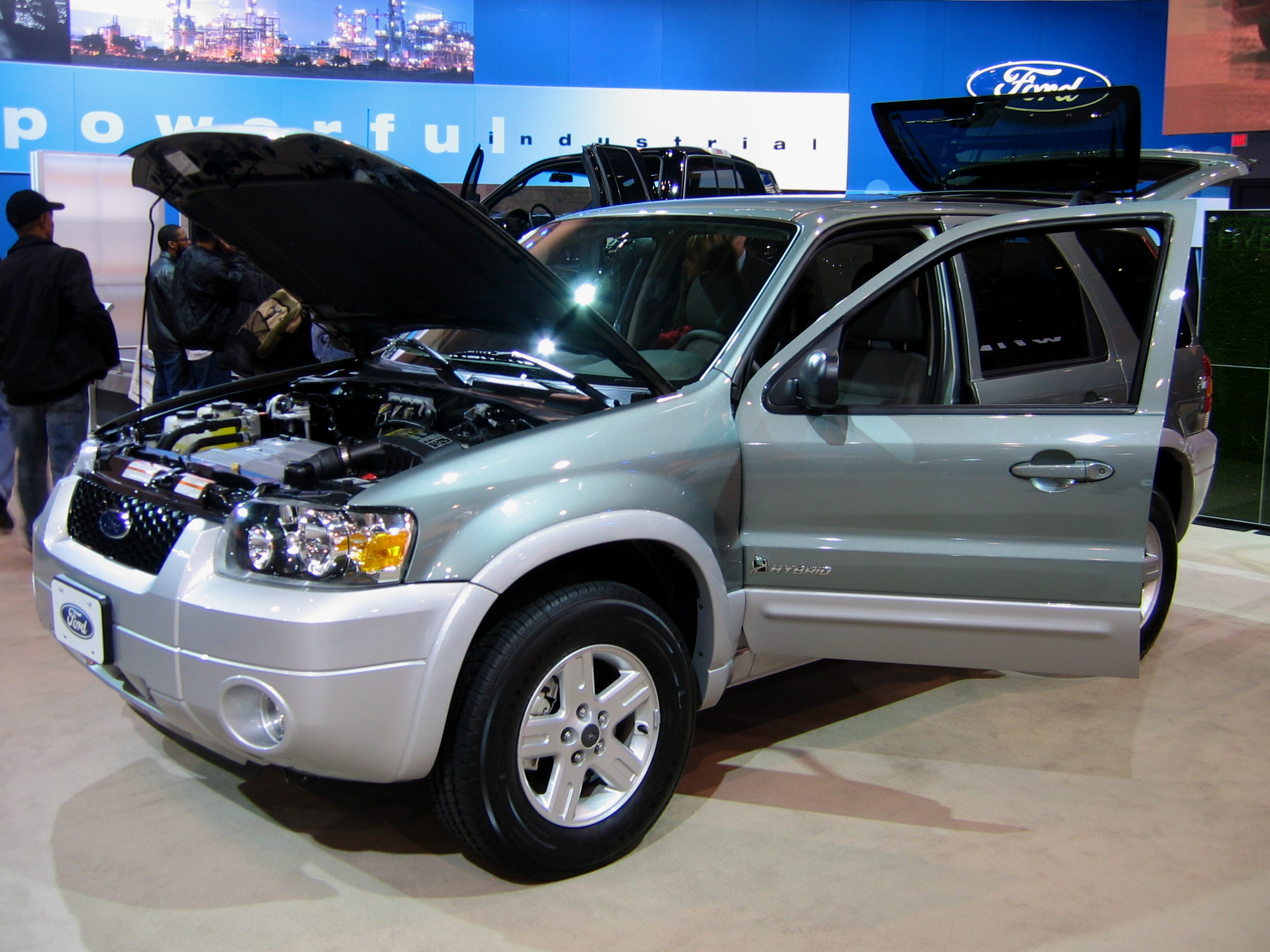 Fisse